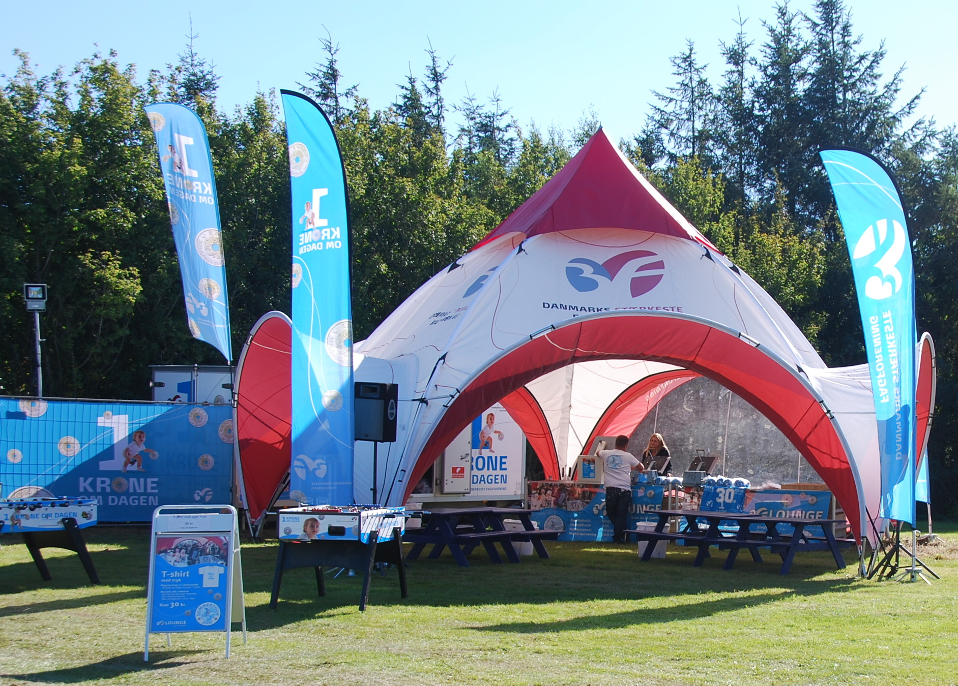 Messetelt fra Fagligt Fælles Forbund (3F).